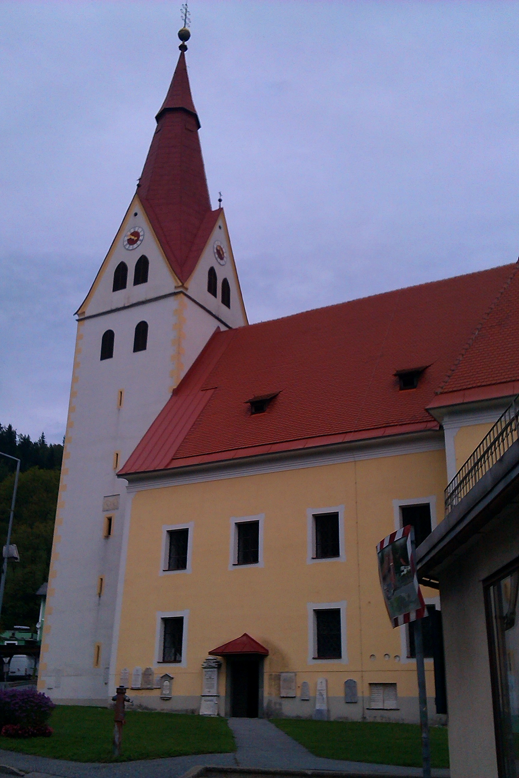 Kath. Pfarrkirche hl. Georg und ehem. Friedhof